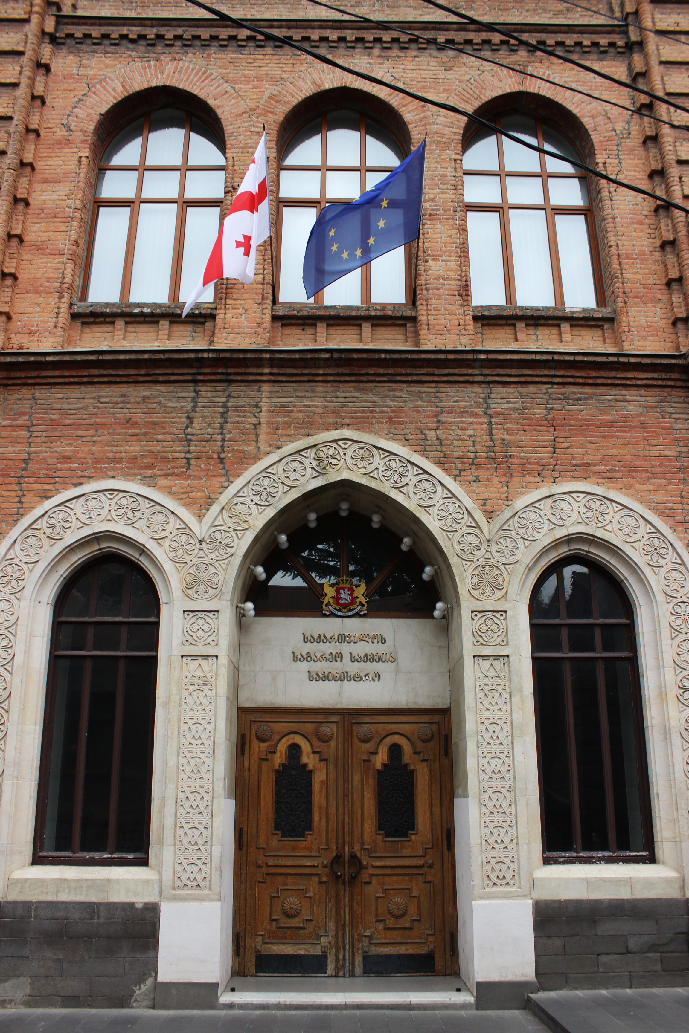 საგარეო საქმეთა სამინისტროს შენობის ფოტო 9 აპრილის ქუჩა N4